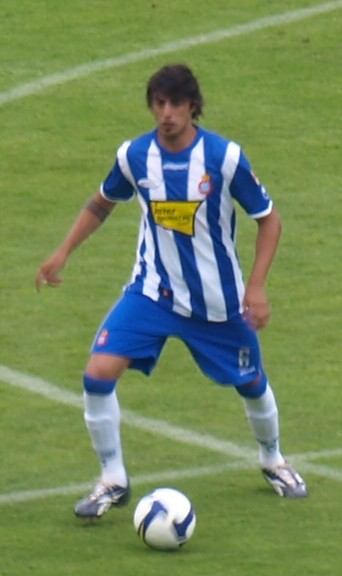 Román Martínez en el partido que enfrentó al RCD Español y al Málaga CF en el último partido de La Liga 2008/09 en el estadio Olímpico de Montjuic.